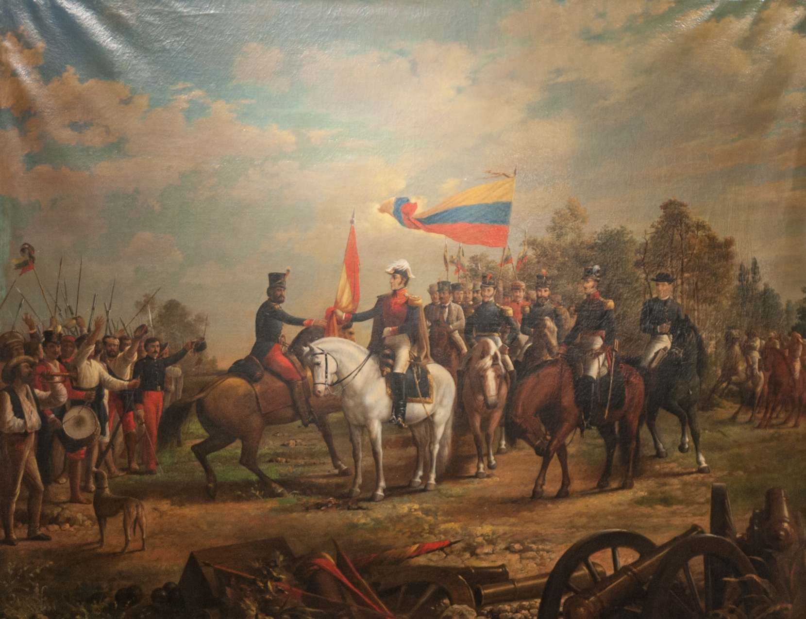 La entrega de la bandera del Numancia al Batallón Sin Nombre (1883)